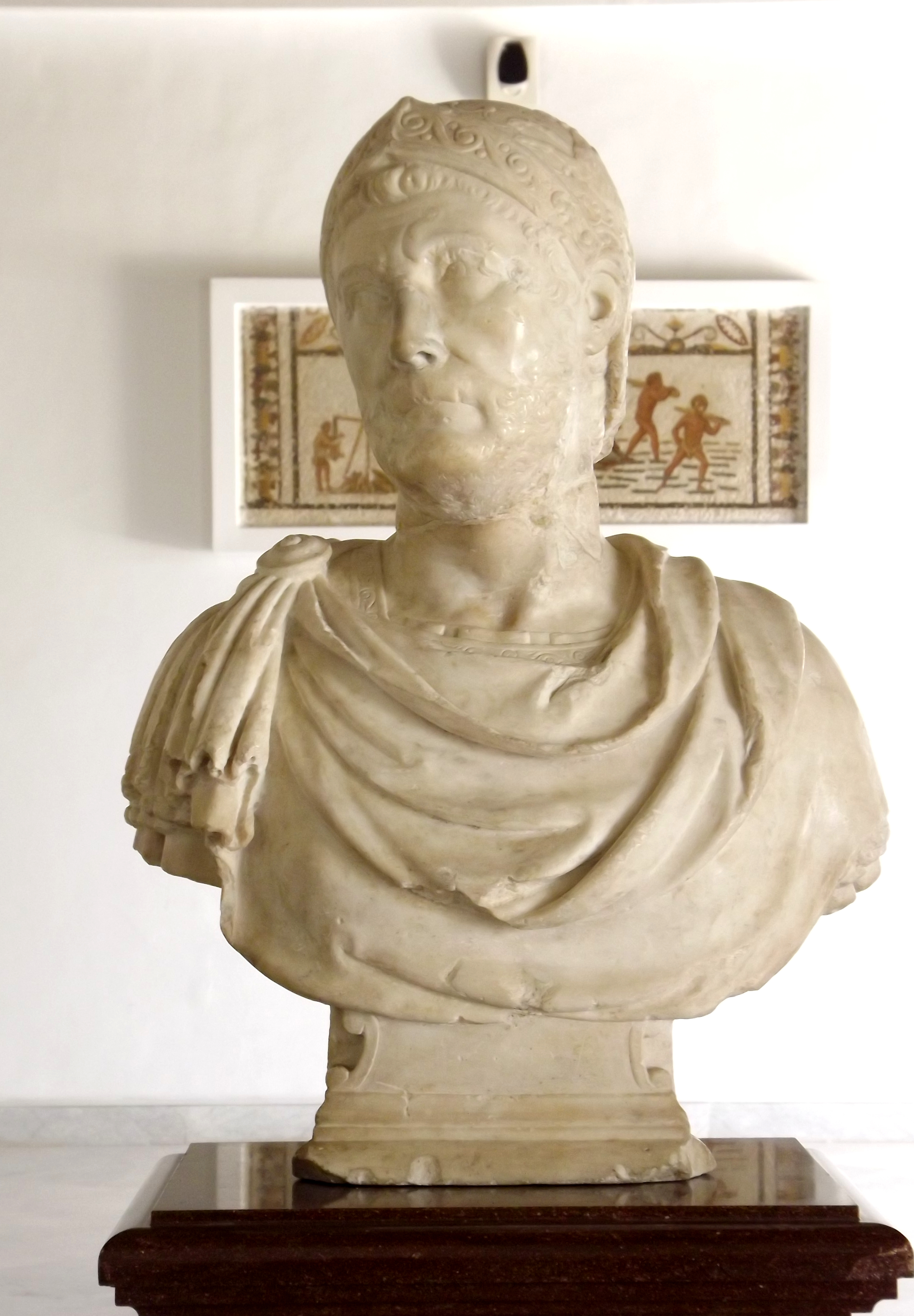 Buste de Hannibal Barca exposé au musée du Bardo à Tunis entre le 27 et le 29 mai 2016. Le buste se trouve actuelle dans le musée achéologique de Naple en Italie.